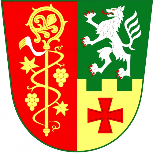 znak, Dobřínsko, okres Znojmo